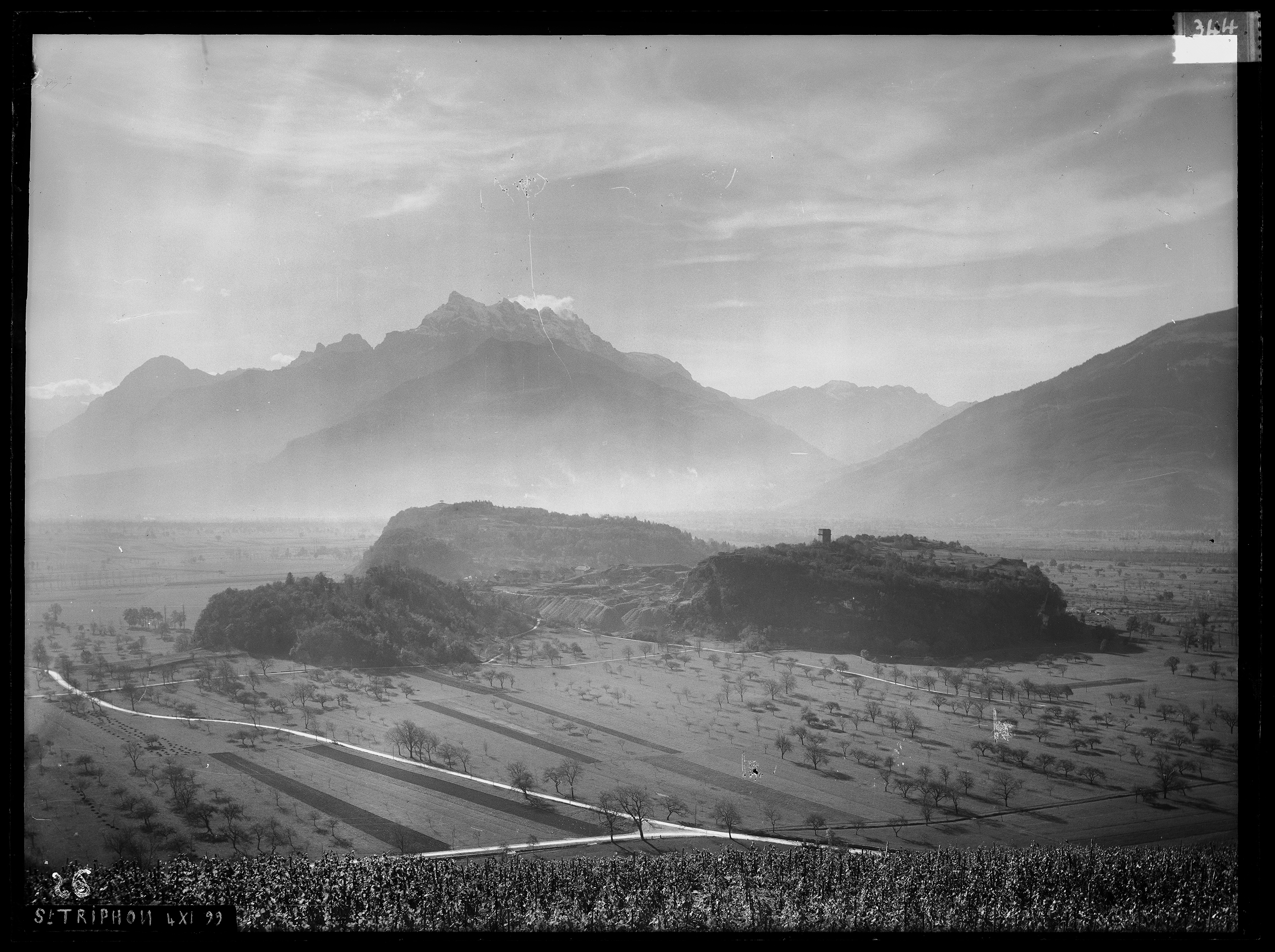 Colline de Saint-Triphon, du village et de la Tour, vue prise depuis les vignes de Verschiez.